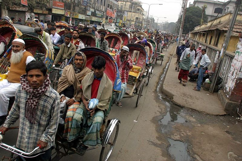 תמונה של פקק תנועה ענק של ריקשות בדאקה, בירת בנגלדש. תמונה שאני צילמתי, ינואר 2006.